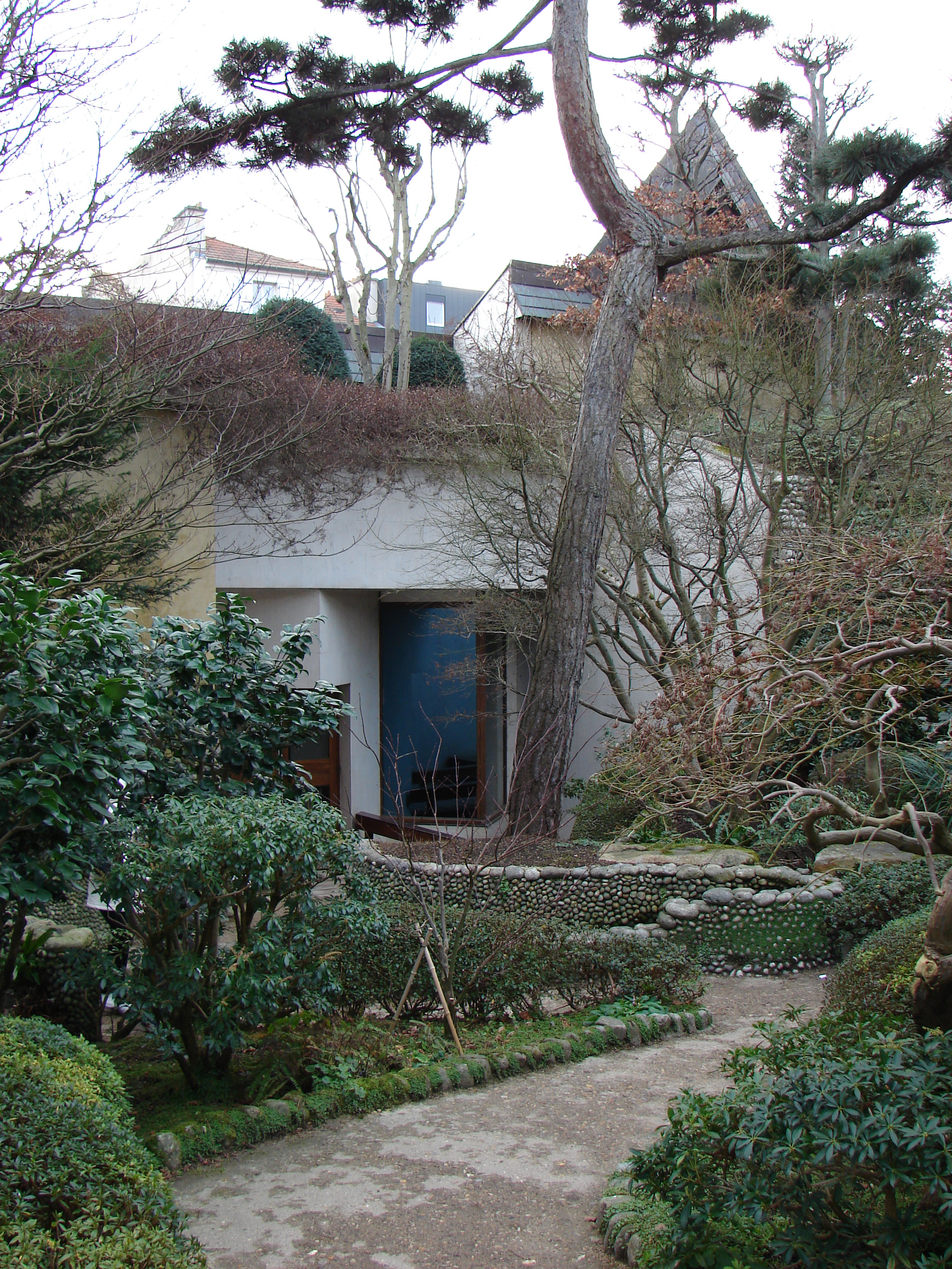 Musée départemental Albert-Kahn entrée (vue du jardin)